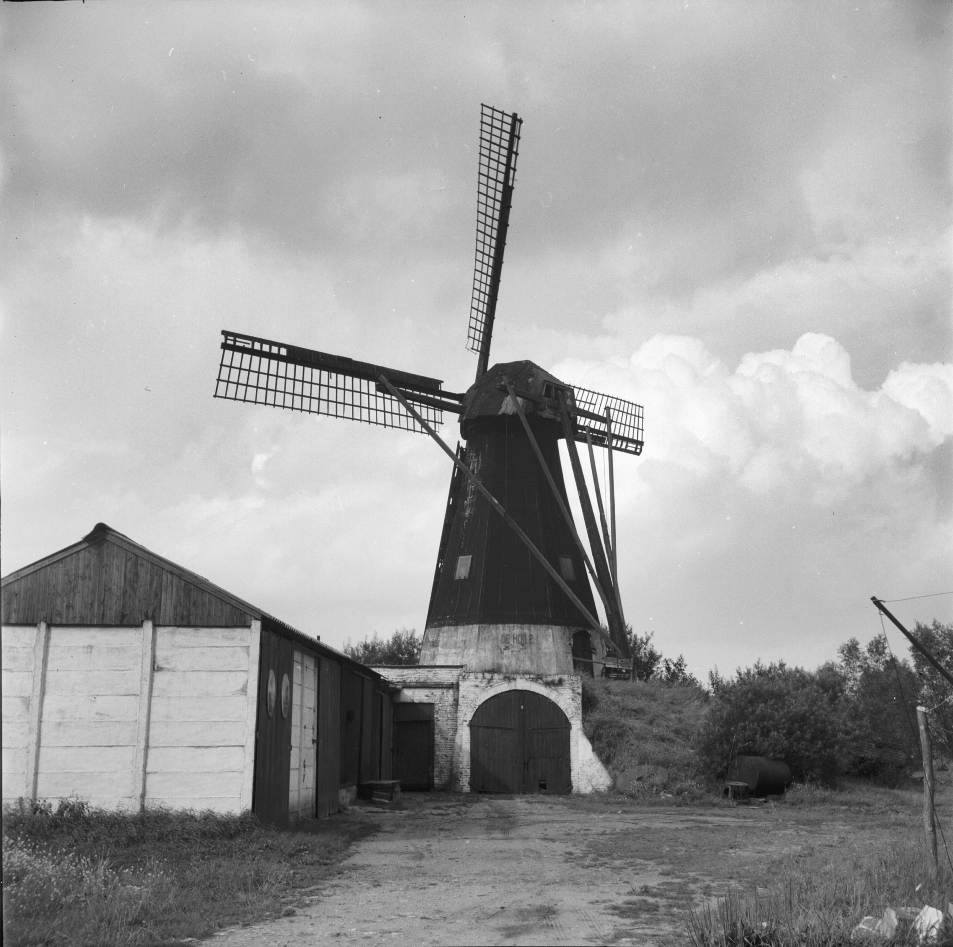 Diversen: Korenmolen "de Hoop"